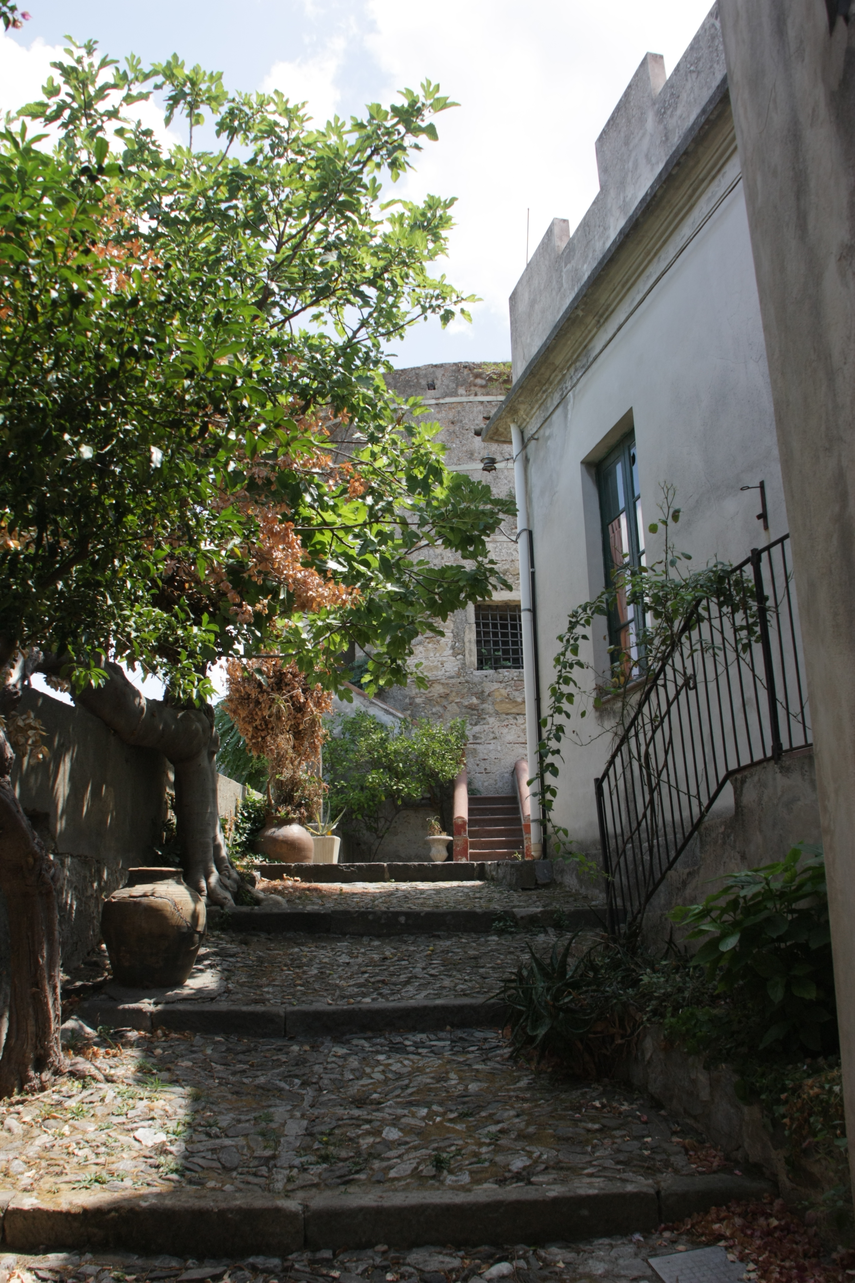 Ingresso castello federiciano (Castroreale)